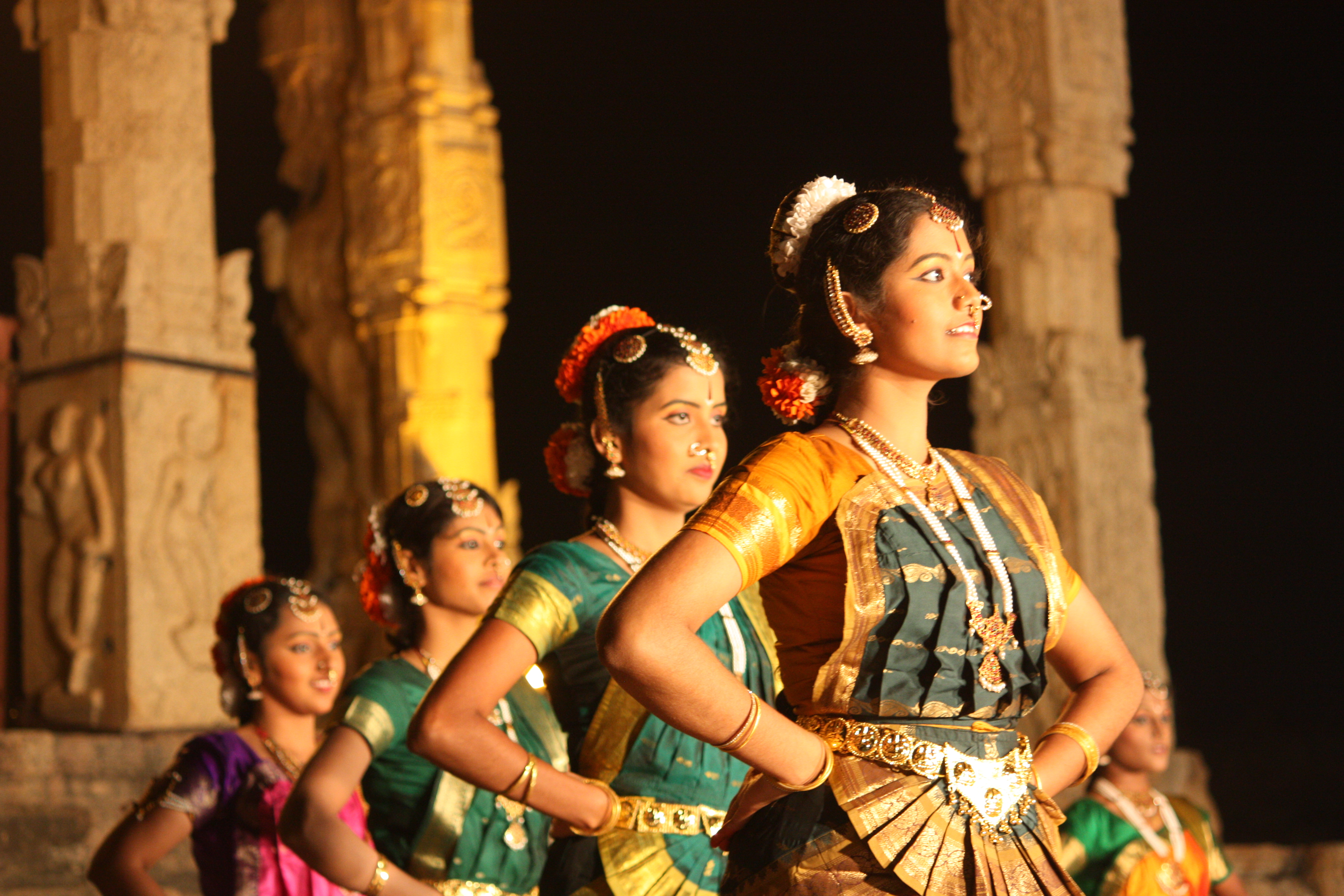 Thanjavur, Brihadishwara Temple, dance